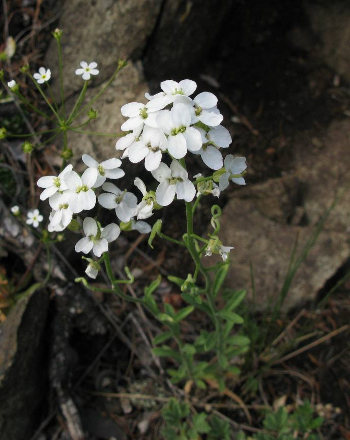 Цветущая Стевения левкойная (Stevenia cheiranthoides) в каменистой степи в окрестностях г. Красноярска.